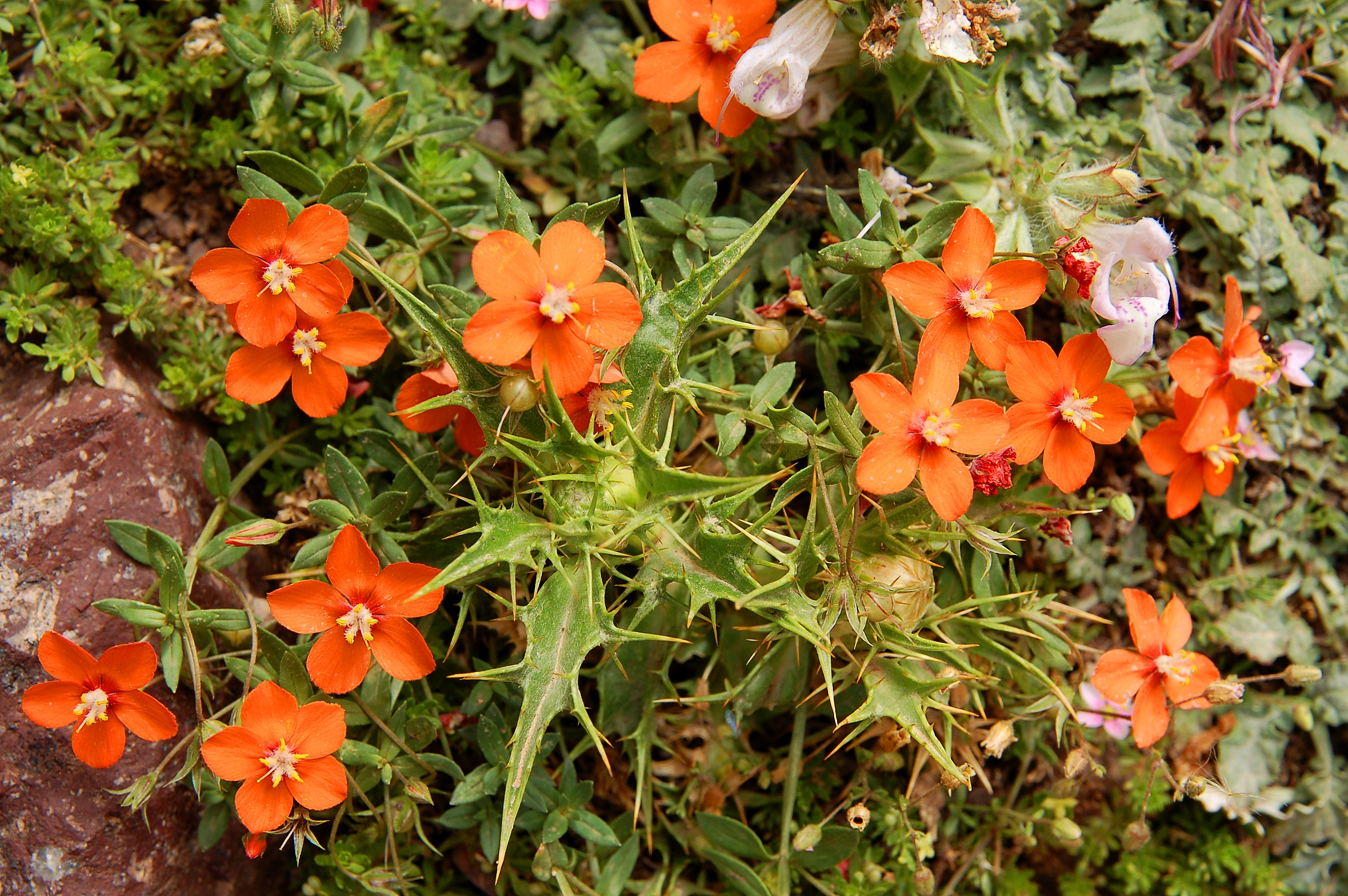 Anagallis arvensis Maroc Atlas vallée de l'Imlil